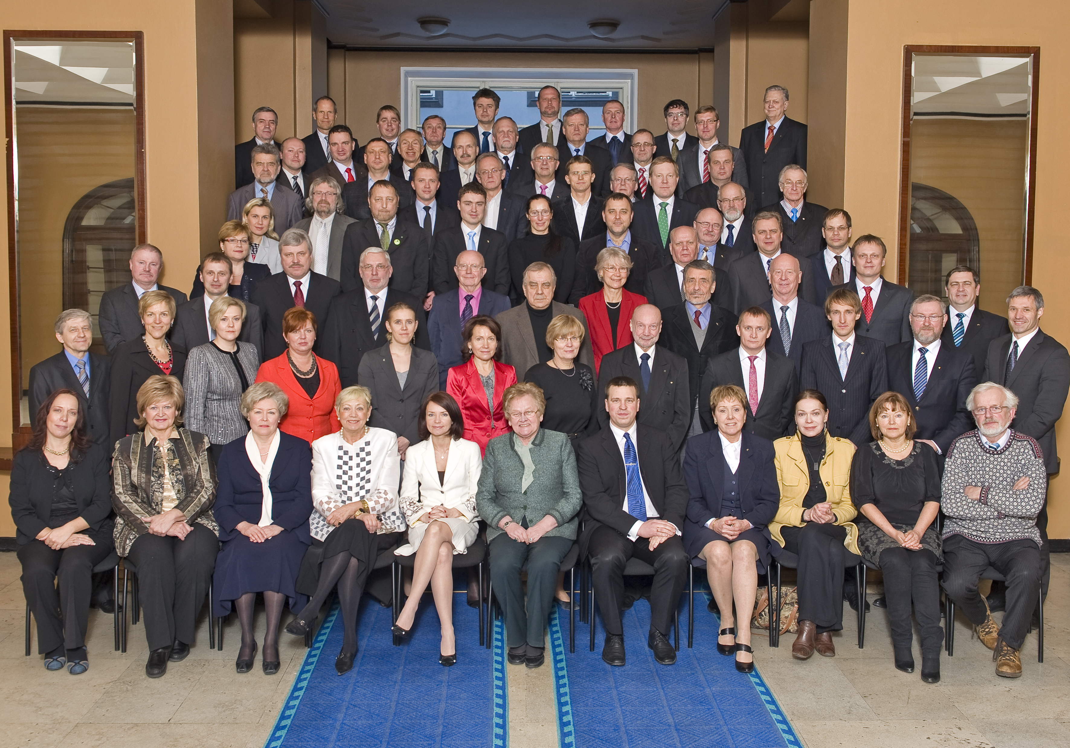 XI Riigikogu koosseisu lõpupilt 23. veebruaril 2011.